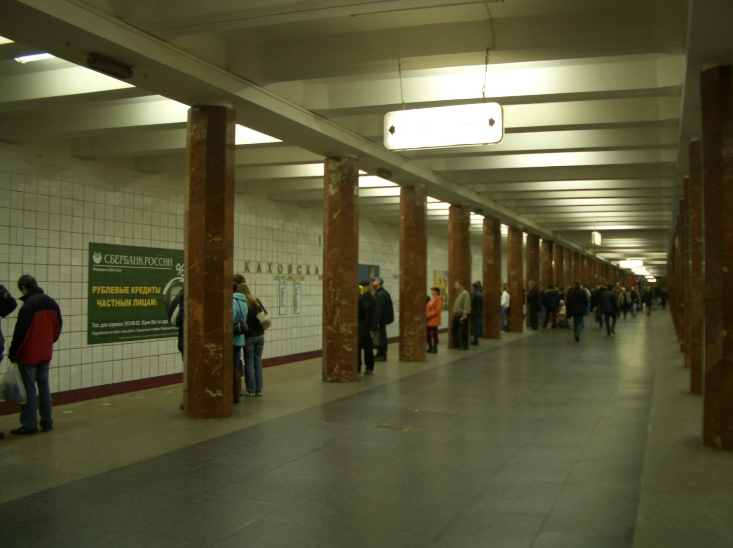 Beschreibung: Metrostation Kachowskaja in Moskau, Oktober 2006 Станция московского метро Каховская, Октябрь 2006 Autor: Lewa